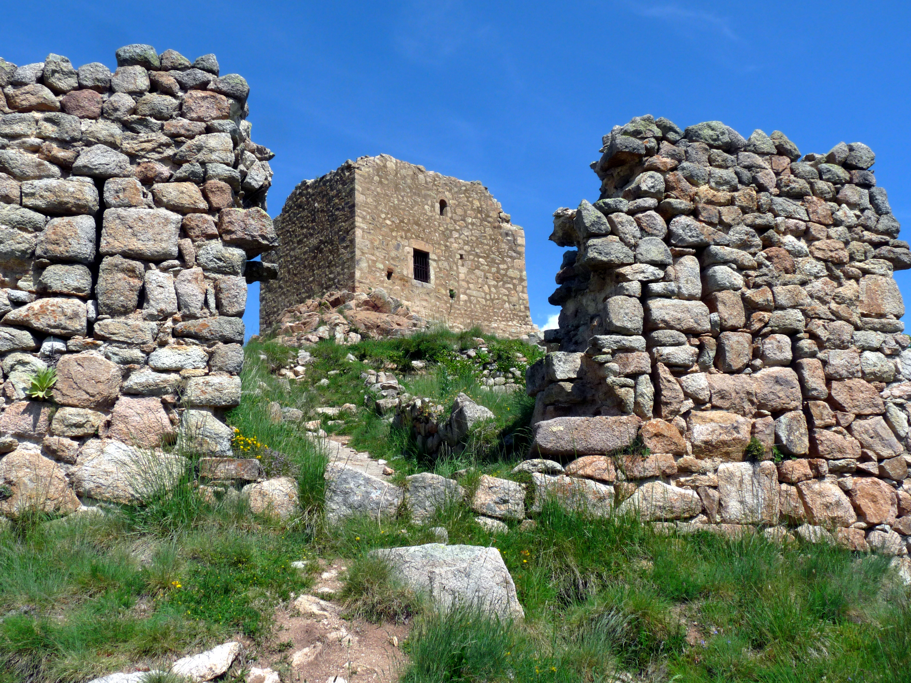 Tours de Cabrenç (Tour médiane face sud)